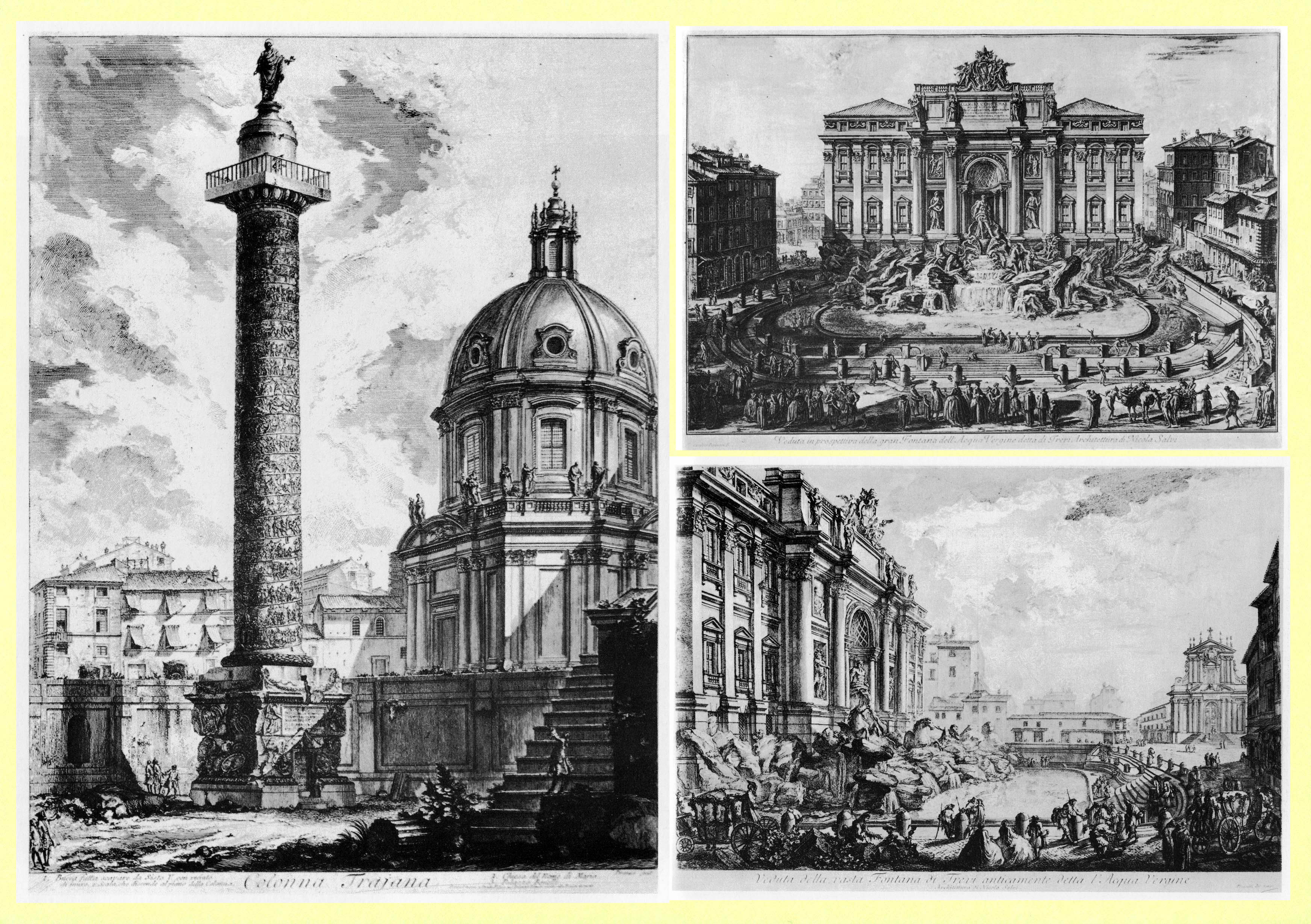 Piranesi vedutái